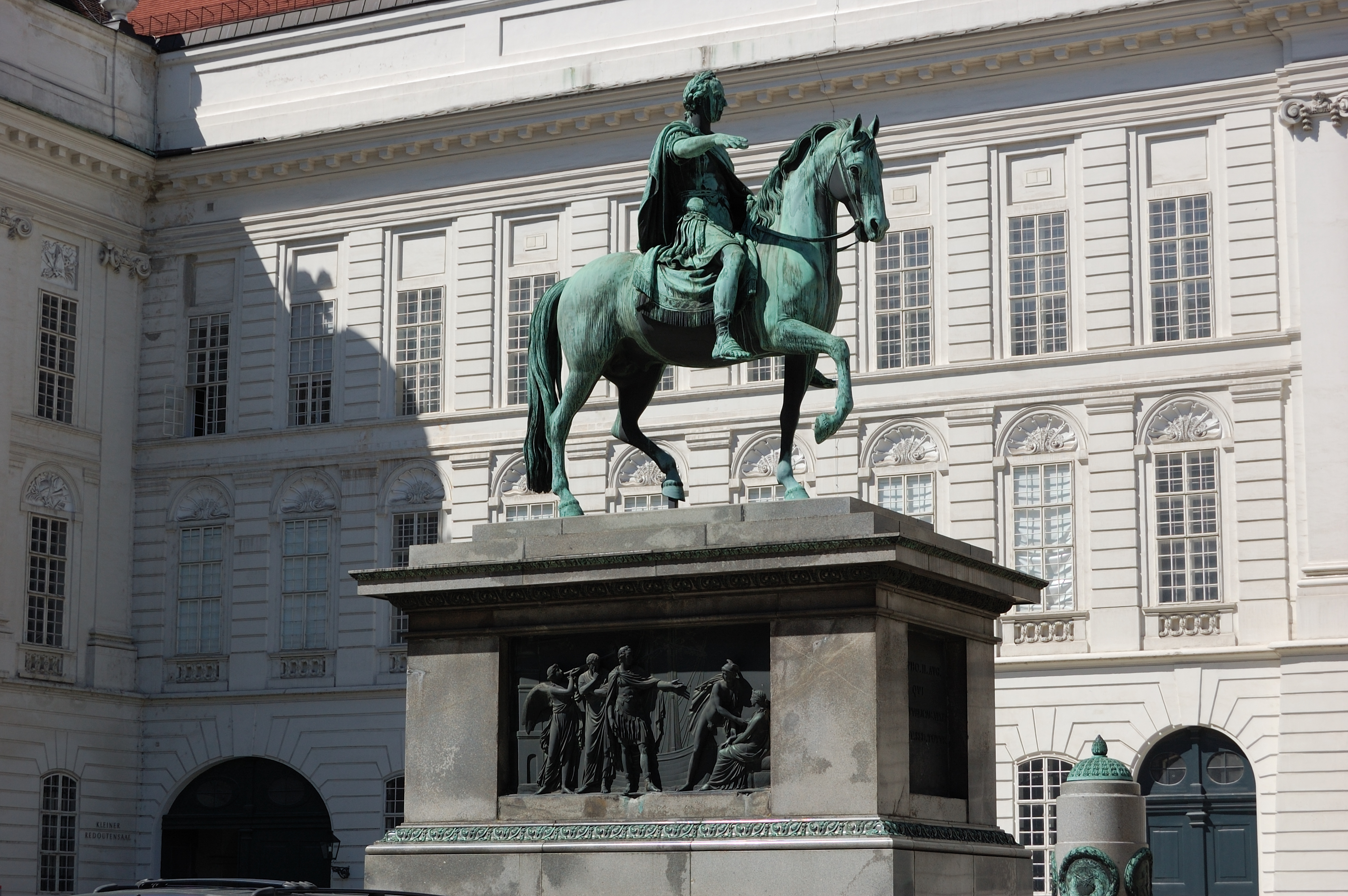 Josefsplatz